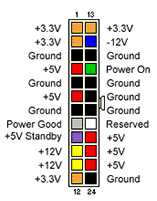 Схема розпіновки контактів блока живлення комп'ютера.